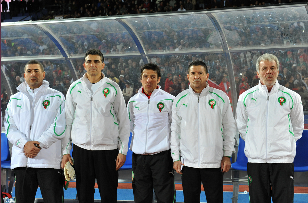 Eric Gerets et ses adjoints